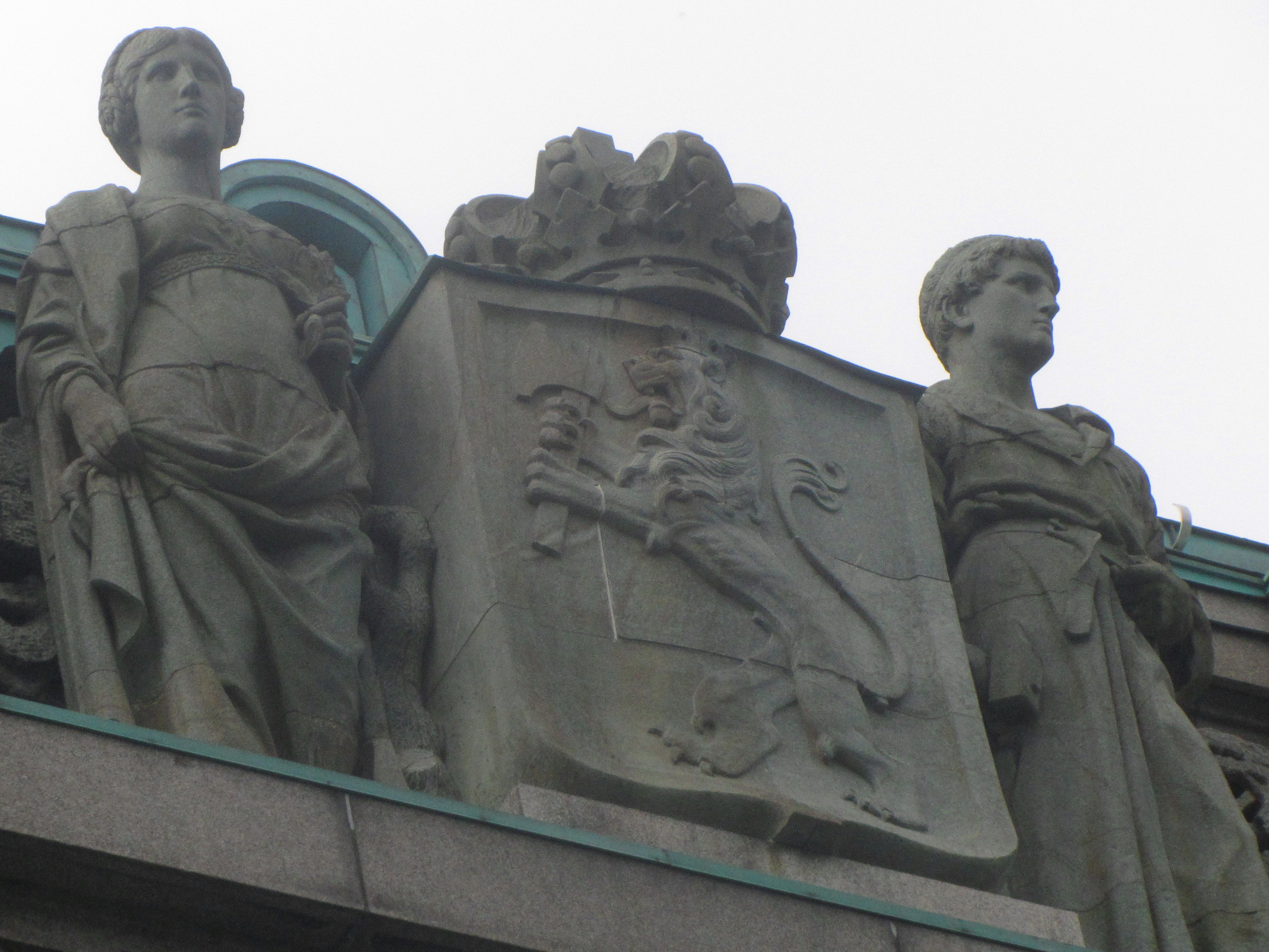 Kolossalgruppen Arbeid og fred med riksvåpenet mellom seg. Utført av Lars Utne. Fra fasaden på Norges Bank, nå Museet for samtidskunst.